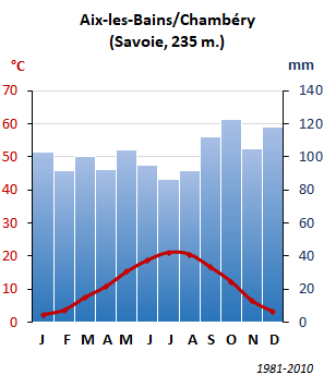 Diagramme ombrothermique d'Aix-les-Bains-Chambéry (Savoie, 235 m.), sur les moyennes mensuelles de 1981-2010.